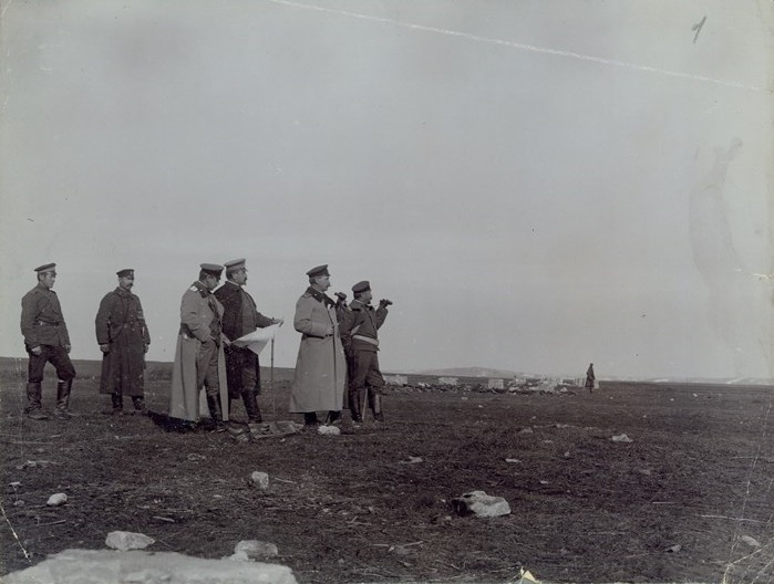 Командващият Четвърта армия генерал Стилиян Ковачев с офицери на позиция при Булаир.